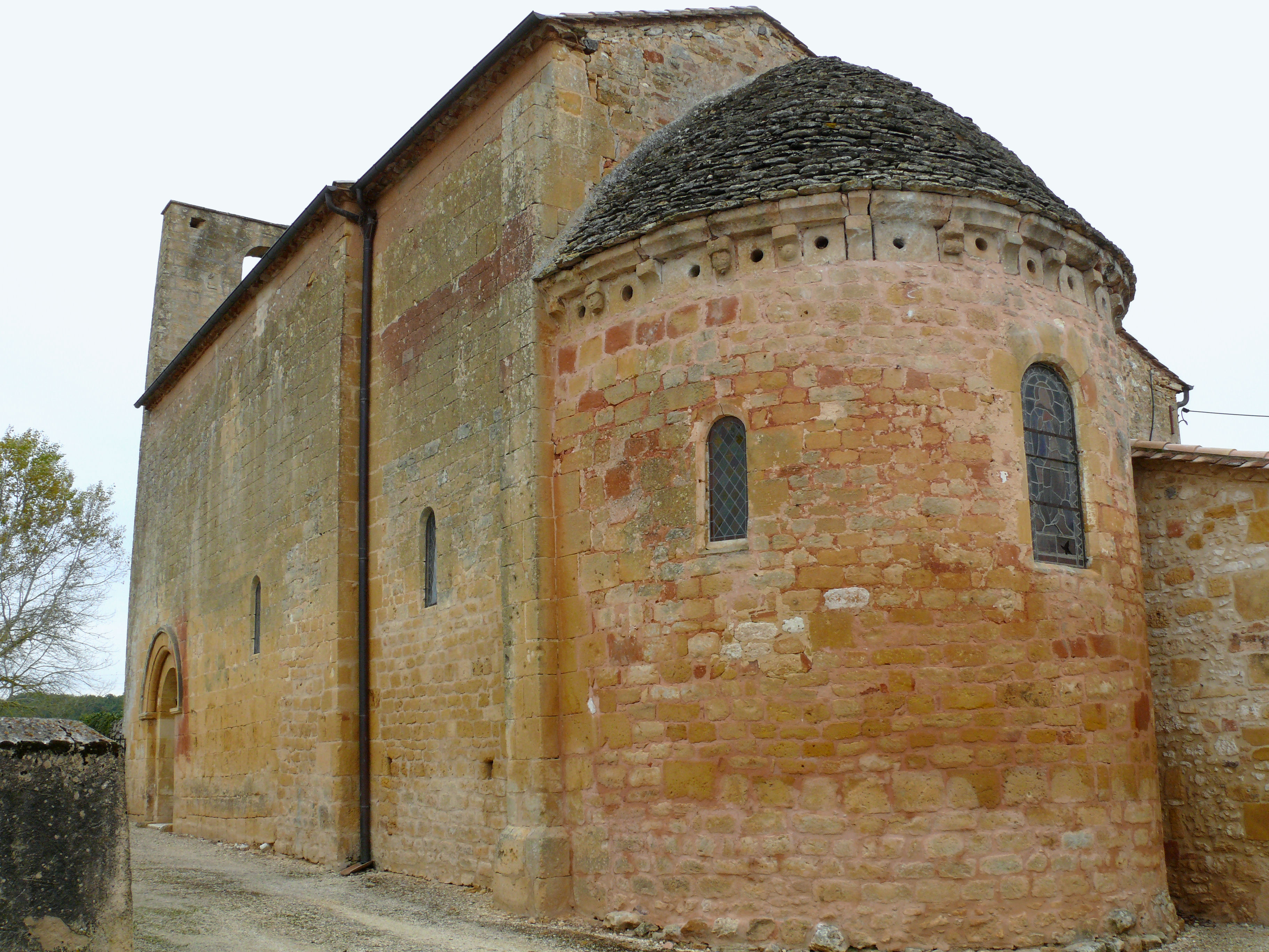 Lolme - Eglise Notre-Dame - Chevet